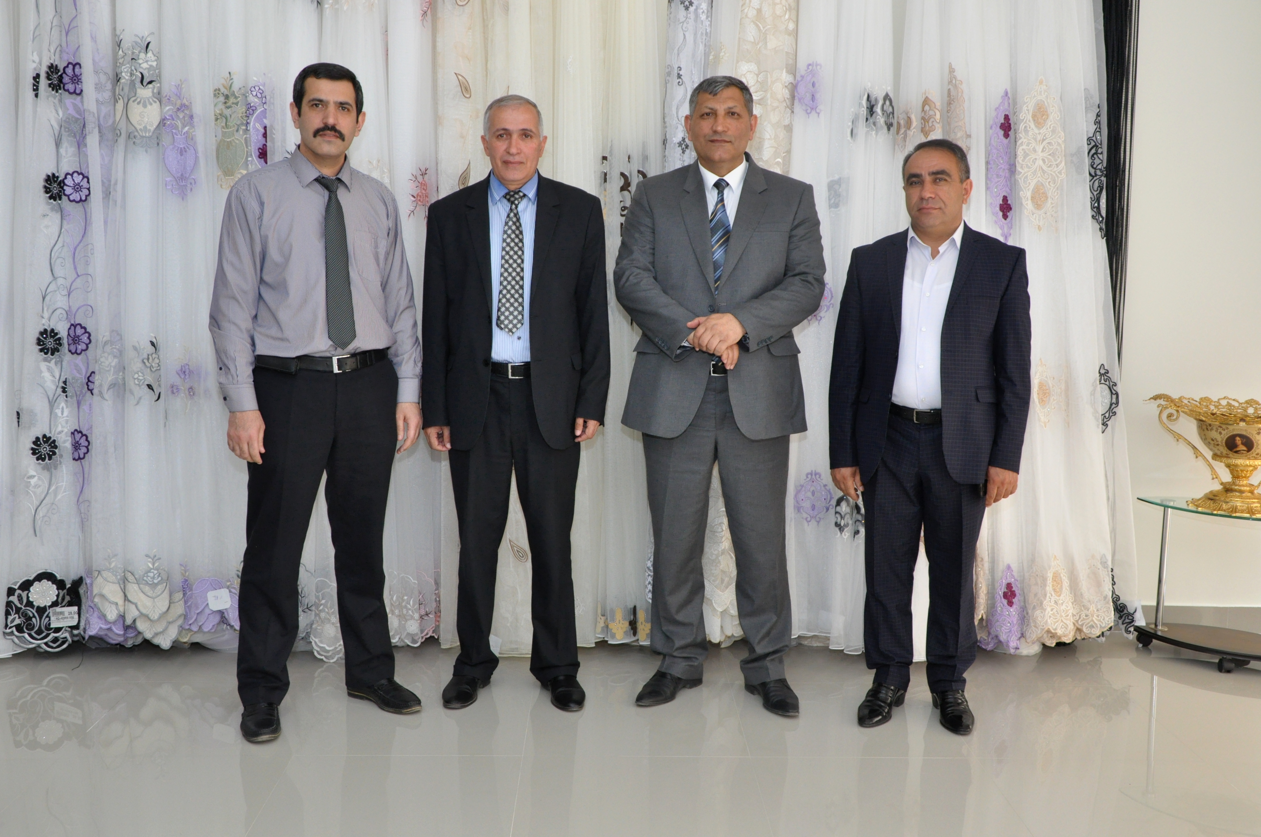 Araz Yaquboğlu, Arif Məmmədli, Nağdəli Zamanov və Aşıq Firudin. "Capsella". Bakı, Təbriz 71.